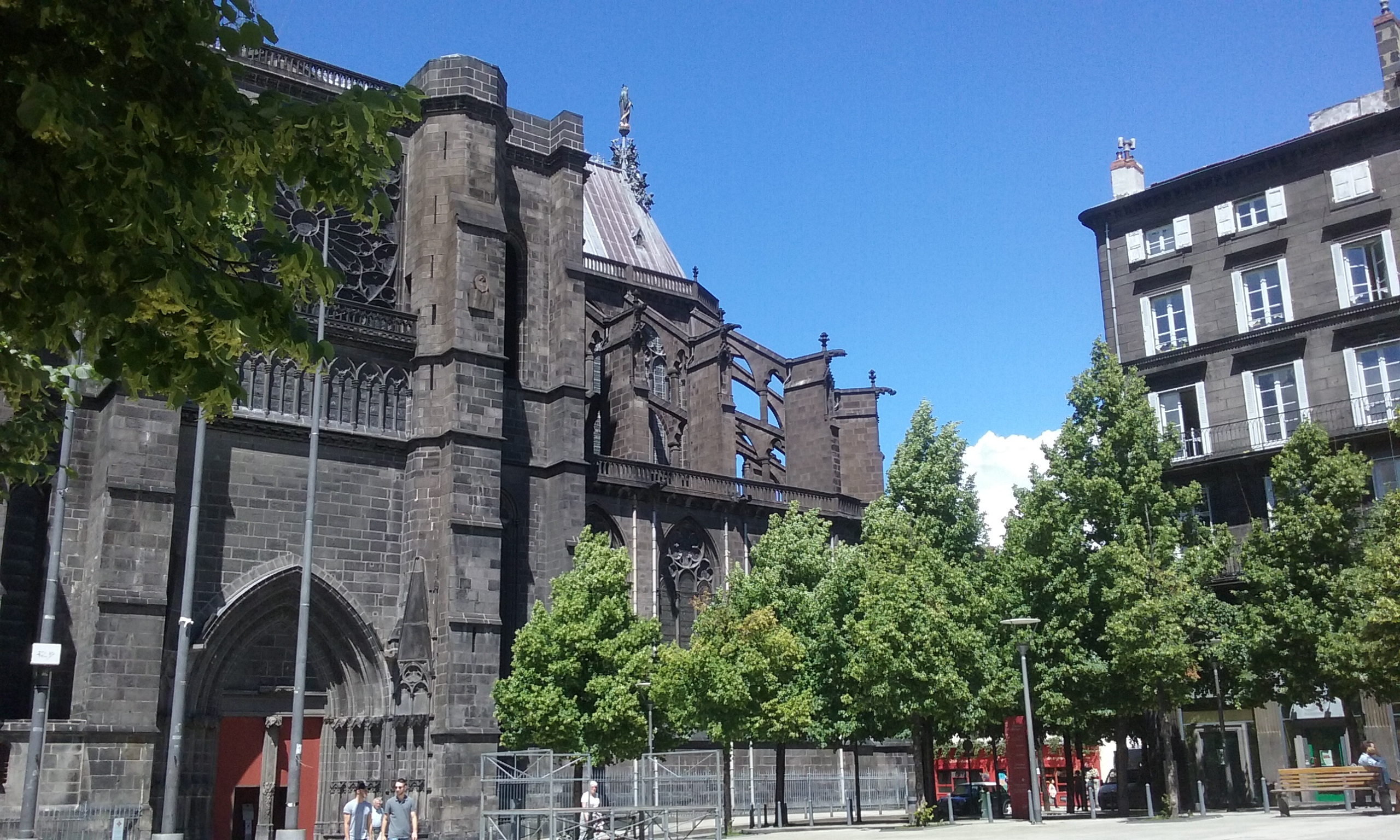 Place de la Victoire (partie nord) et façade méridionale de la cathédrale Notre-Dame-de-l'Assomption de Clermont-Ferrand. .